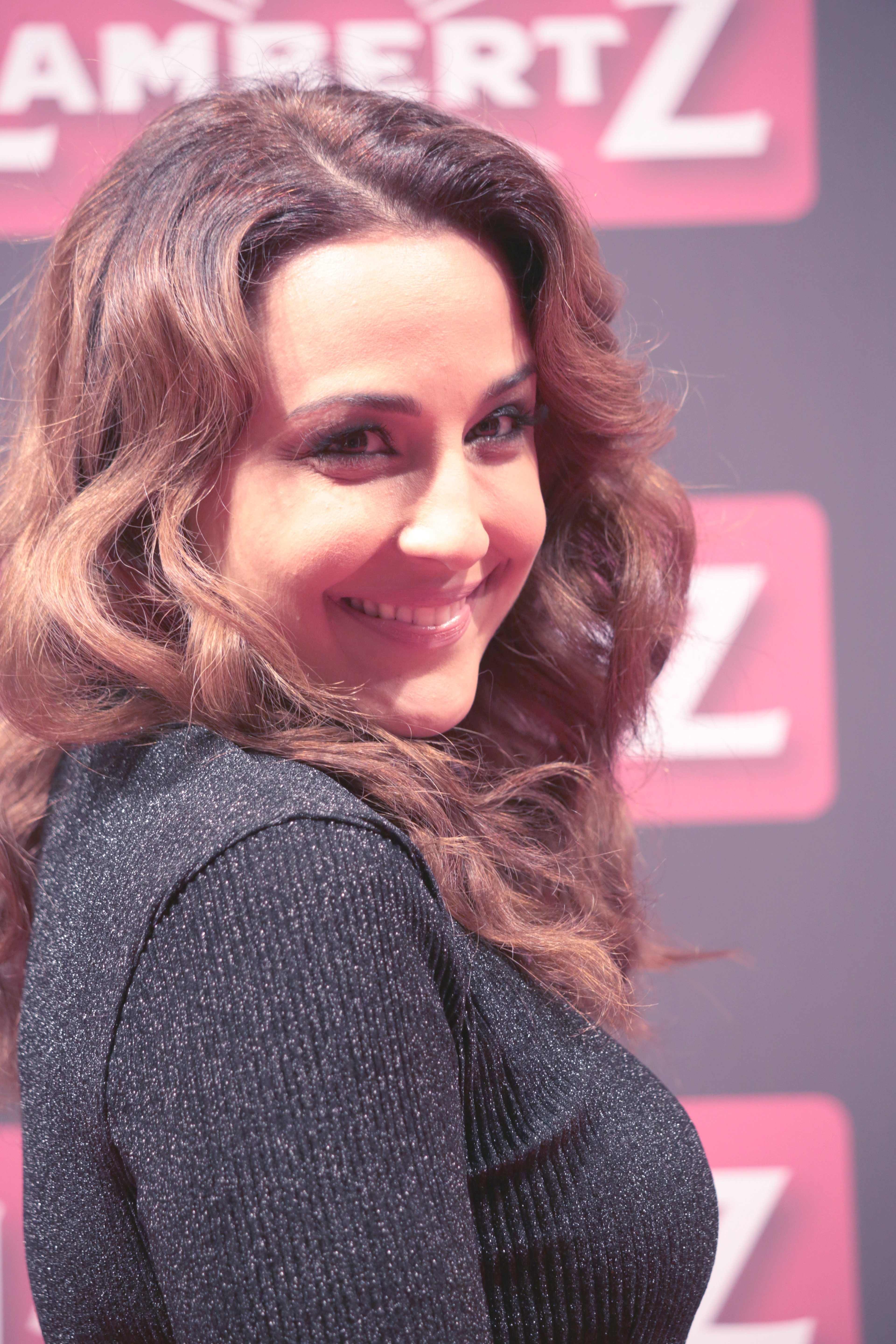 Nina Moghaddam bei der Lambertz Monday Night 2018.